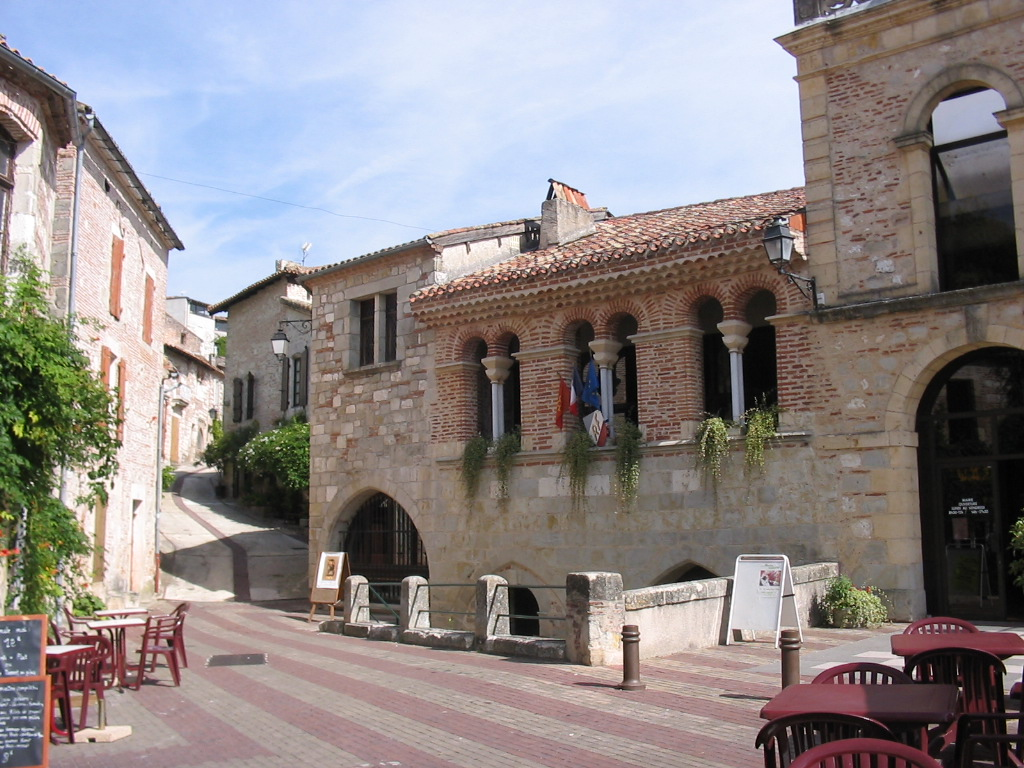 In der Altstadt von Penne-d'Agenais